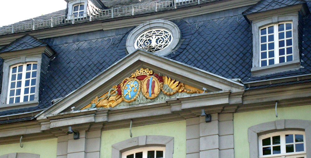 Haus Troistorff